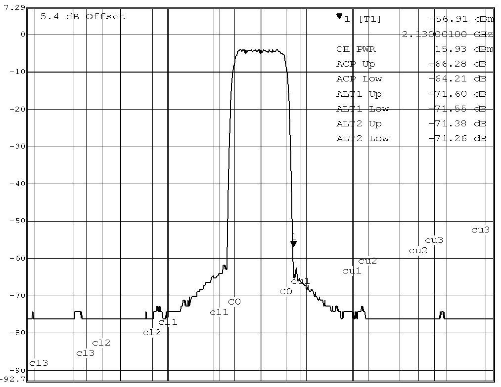 Beispiel für eine ACP Messung mit einem UMTS FDD Träger